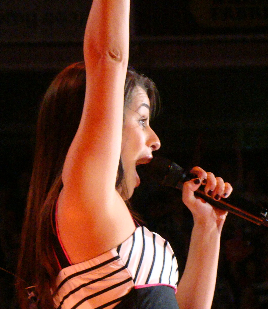 Firework